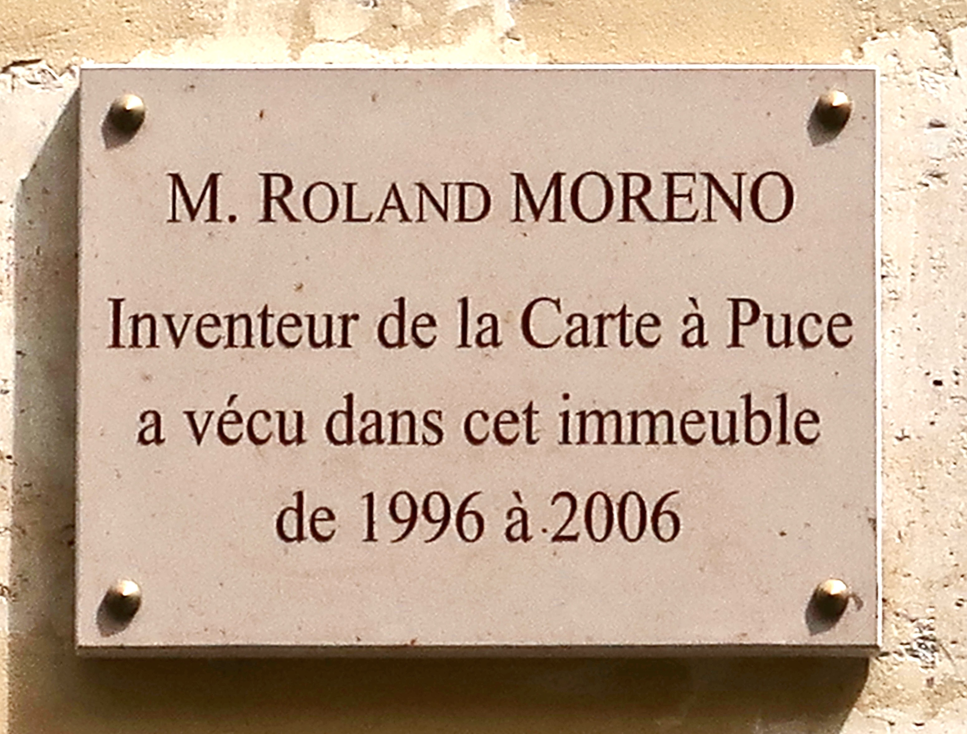 Plaque en hommage à Roland Moreno, 3 rue de l'Ancienne-Comédie (Paris, 6e).